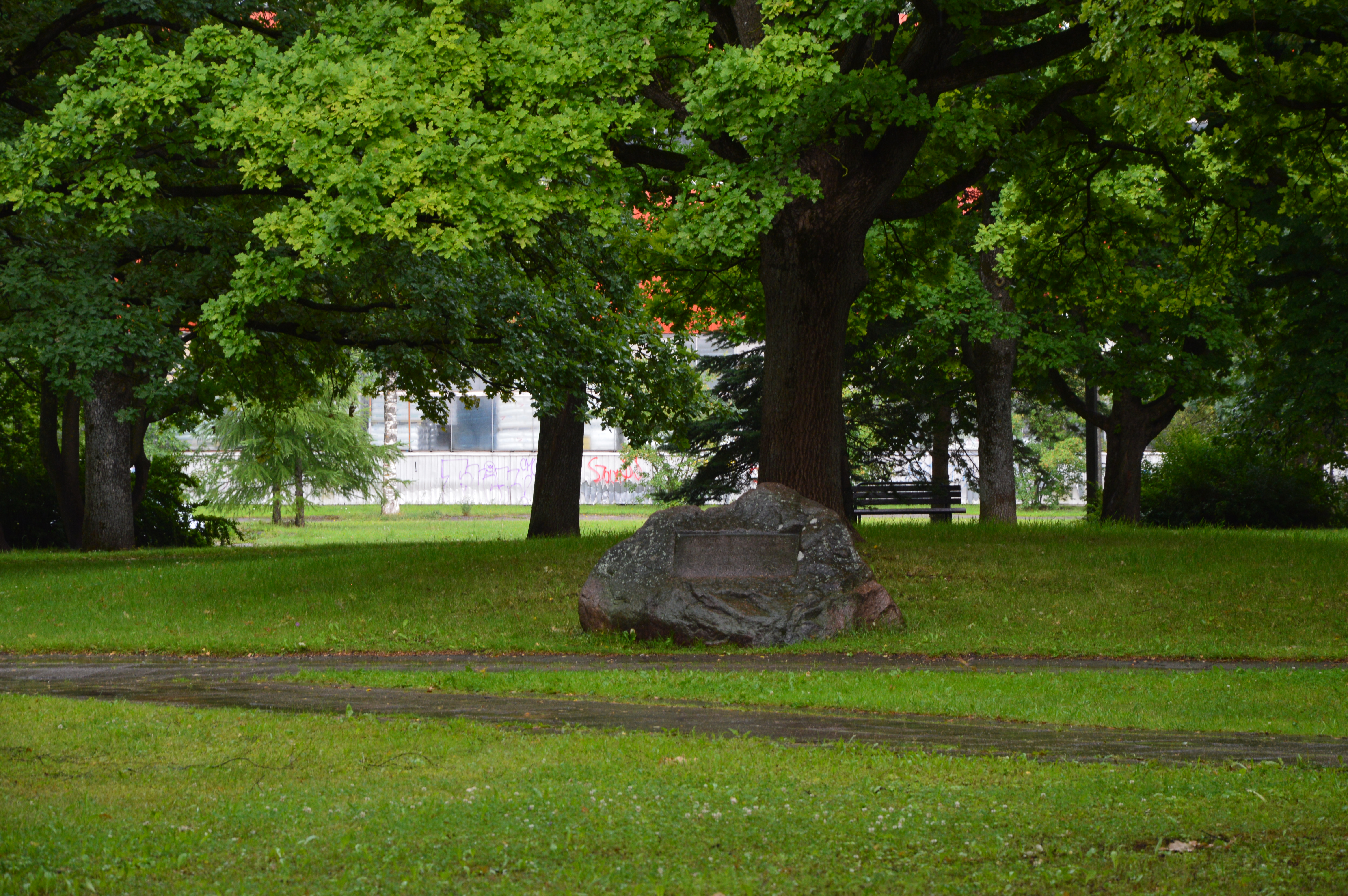 Forseliuse park Tartus. Forseliuse seminari mälestuskivi.